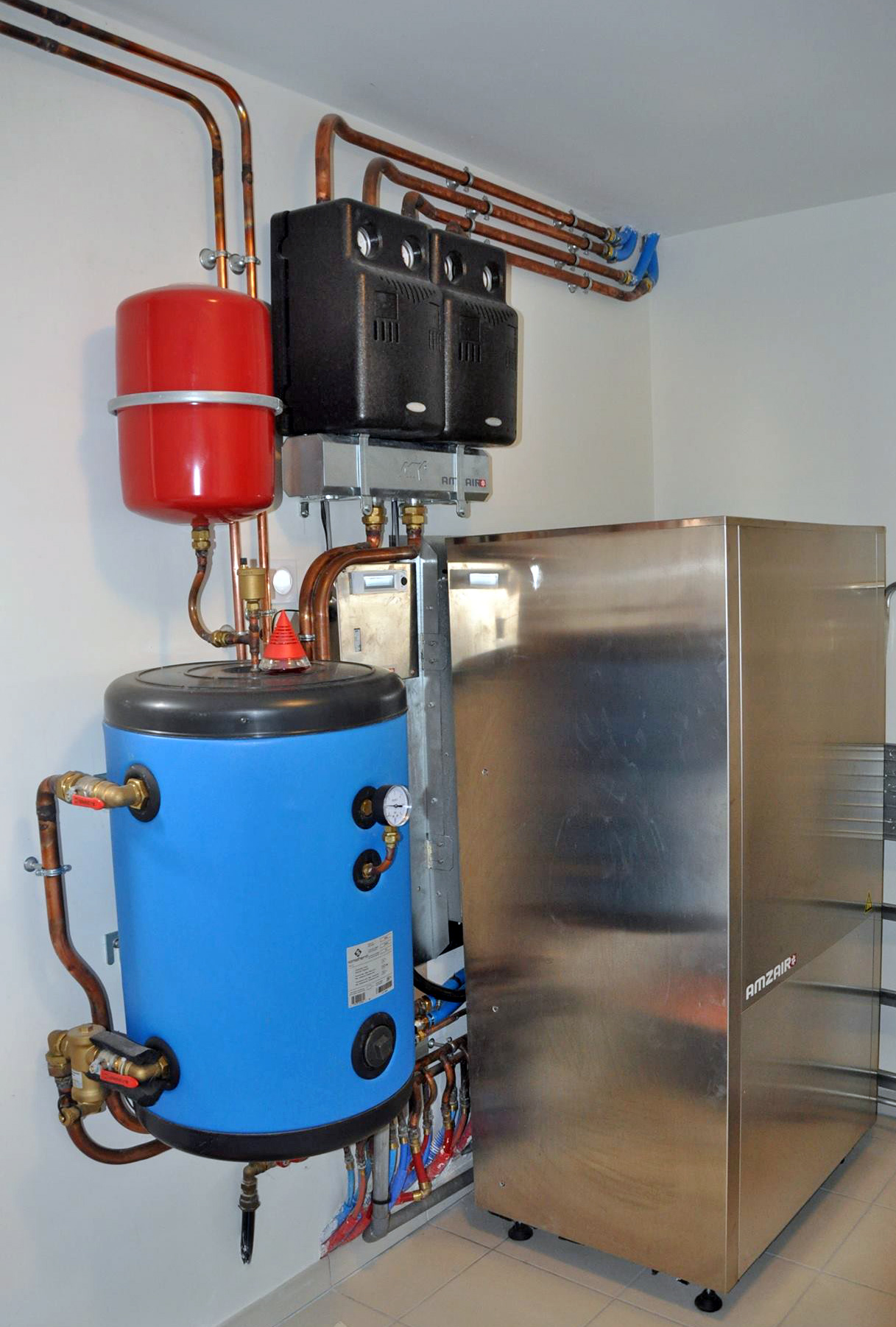 Une pompe à chaleur BBC Silenz de l'entreprise bretonne Amzair avec un ballon tampon et l'option kit deux zones.